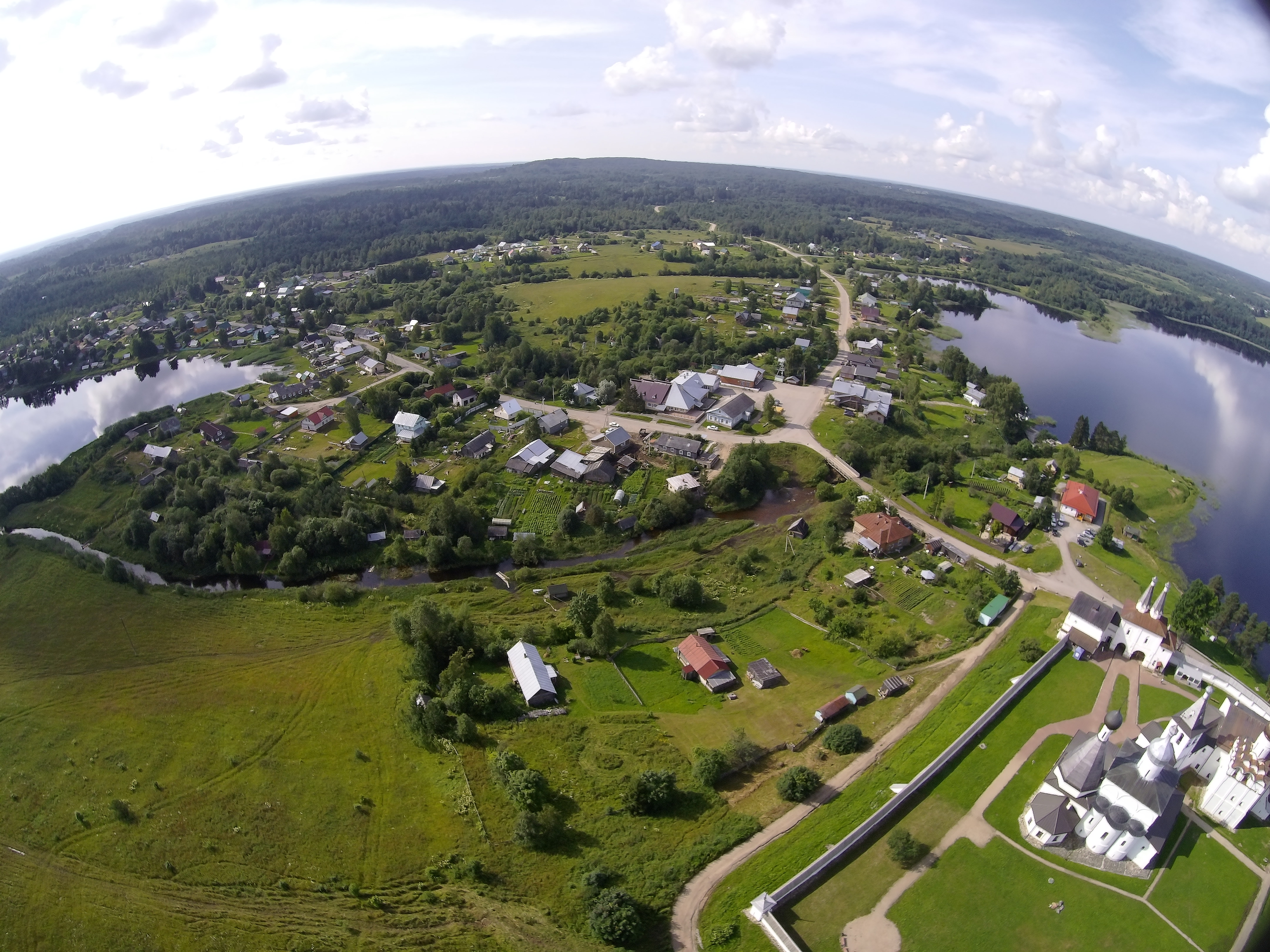 Ферапонтово